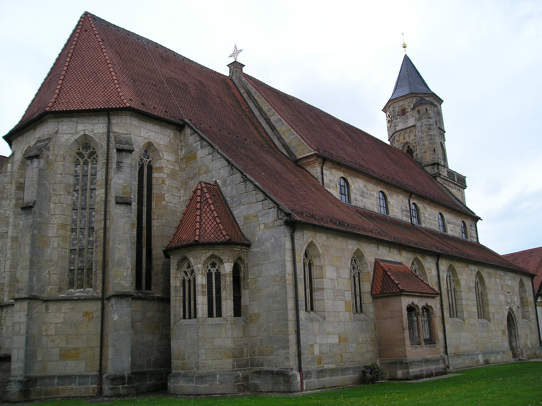 St. Michaelkirche (Catholic church) in Neunkirchen am Brand (Bavaria, Germany).